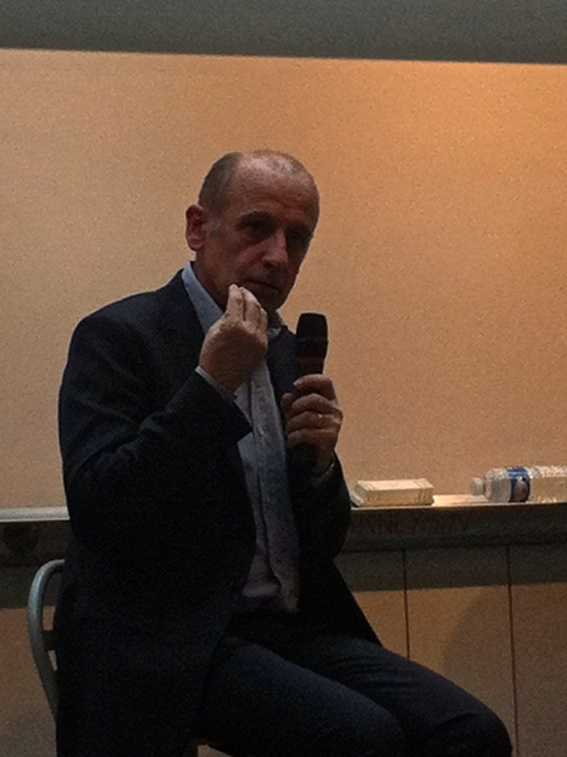 Le journaliste Jean-Michel Aphatie devant des étudiants de Sup de Pub à Paris en décembre 2011.